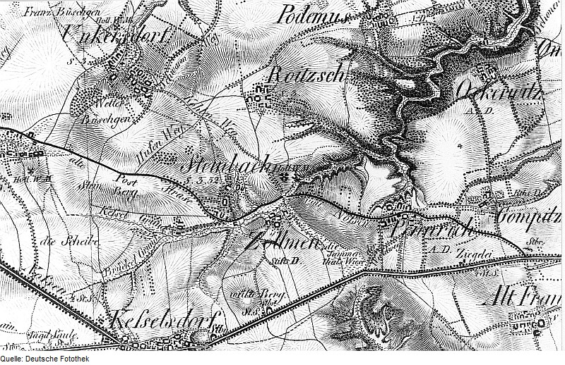 Original image description from the Deutsche Fotothek Dresden-Gompitz-Steinbach. Oberreit, Sect. Dresden, 1821/22